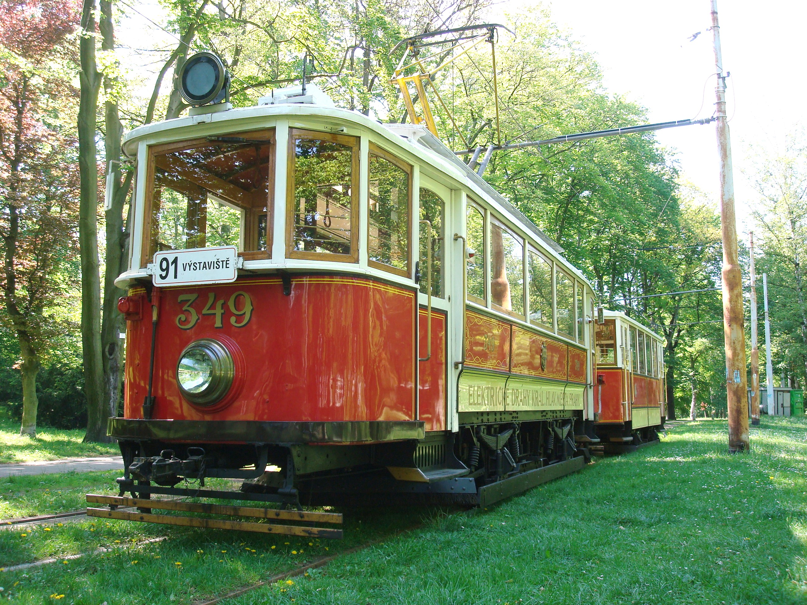 Historická tramvaj ev. č. 349 v Praze